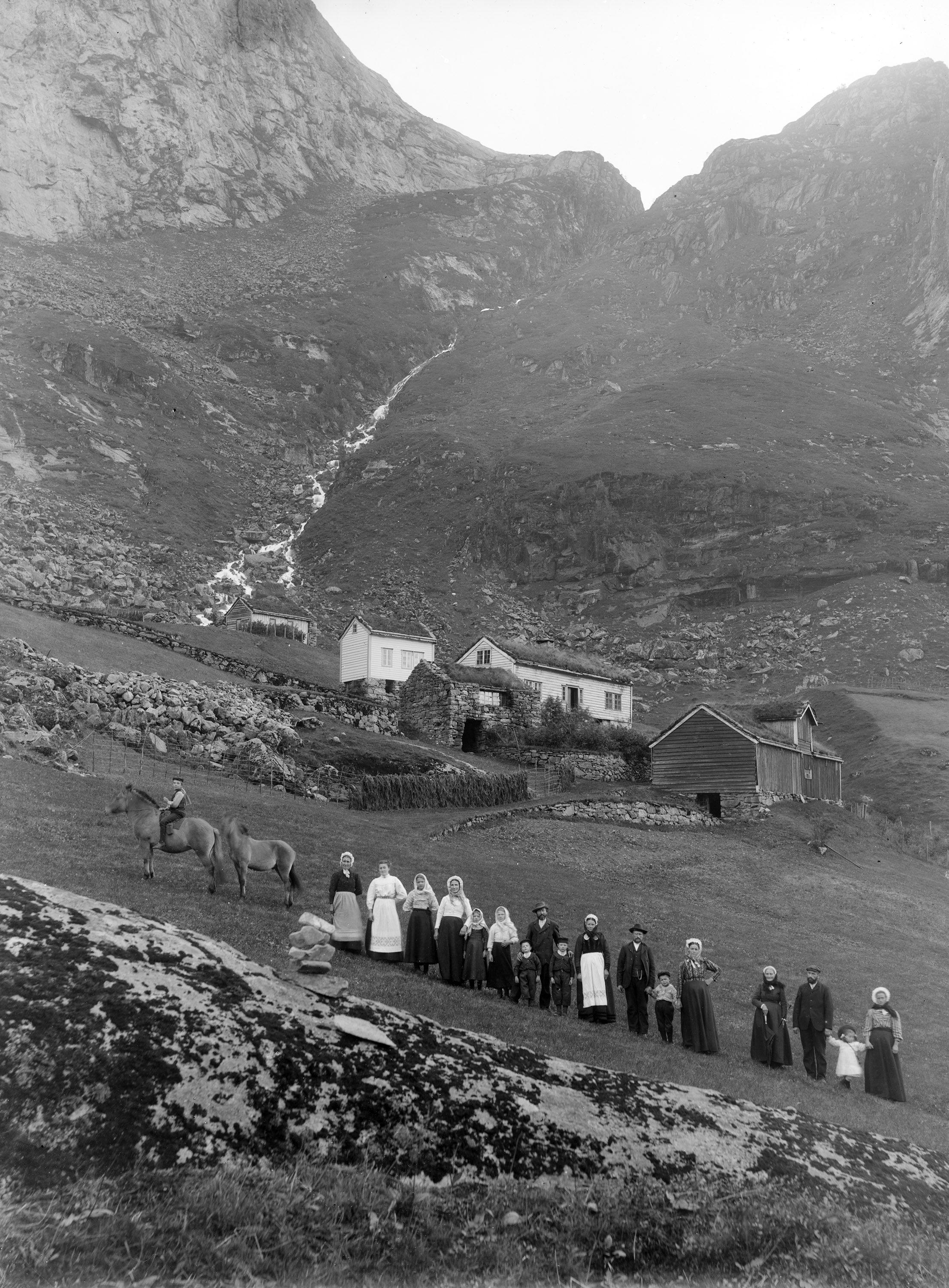 SFFf-100319.181238 The farm Kløvtveit is located on the southern side of the fjord "Austgulfjorden" in Gulen. The people depicted are (left to right): Ole Bertin O. Kløvtveit, Berte L. Kløvtveit, Olina O. Kløvtveit (m. Hantveit), Olina J. Kløvtveit, Ragna R. Kløvtveit, Orpa J. Kløvtveit, Marta J. Kløvtveit, Ludvik J. Kløvtveit, Jakob O. Kløvtveit, Reinhold J. Kløvtveit, Lovise Halland, Anders Dyregrov, Andreas Dyregrov, Hylleborg Dyregrov, Brita Grinde (b. Glosvik), Ola S. Grinde (b. Haugsdal), Bergit O. Grinde og Hansine (Sina) J. Grinde. In 1910, when this picture was taken, the farm was owned by Jakob O. Kløvtveit (1865-1929) and Ragna R. Kløvtveit (1879-1969).